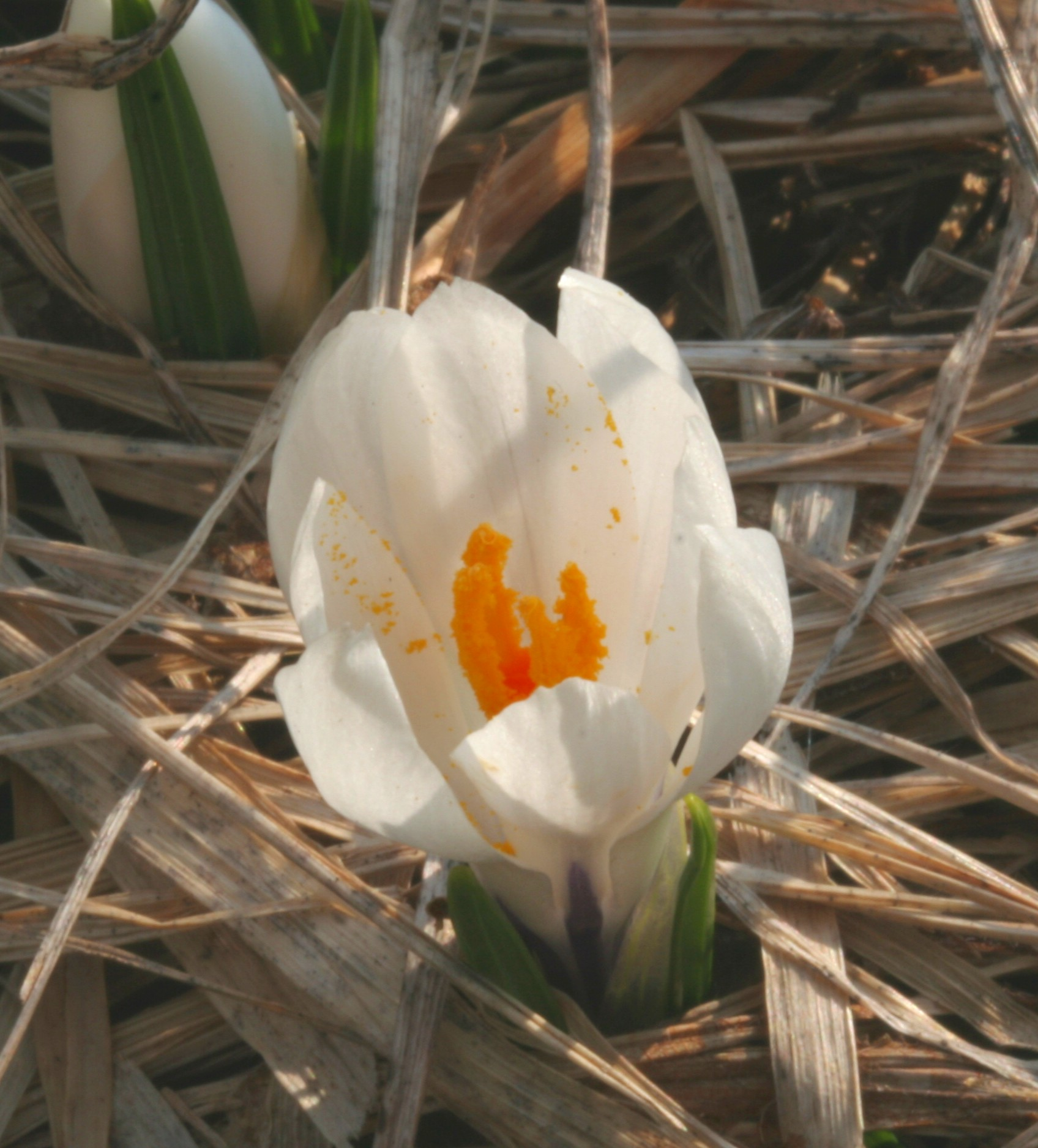 Crocus_albiflorus (Zafferano alpino) Localita: Valmorel, Limana (BL), 800 m s.l.m.